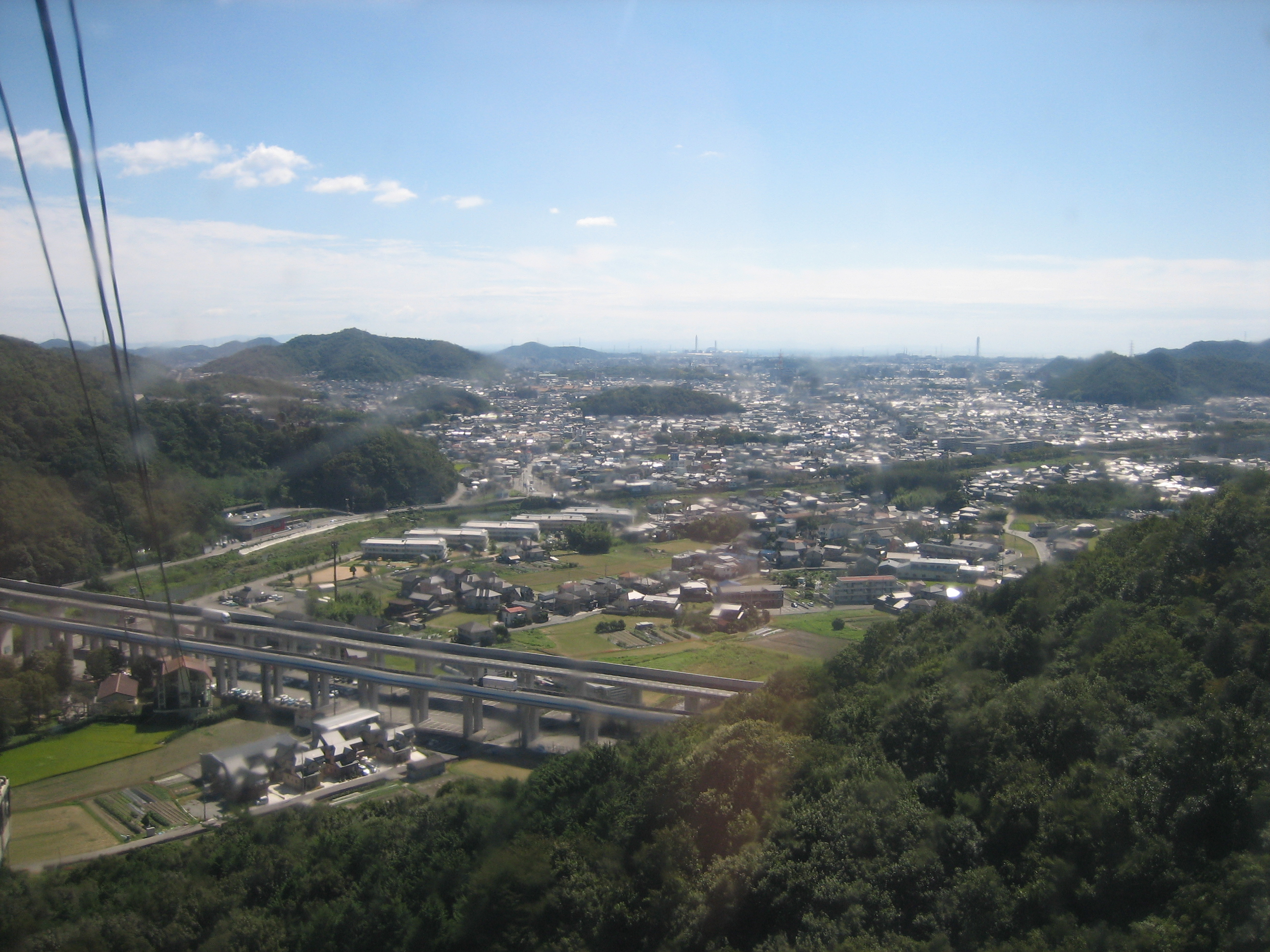 書写山山頂へ登るロープウェイより見た姫路市街地。